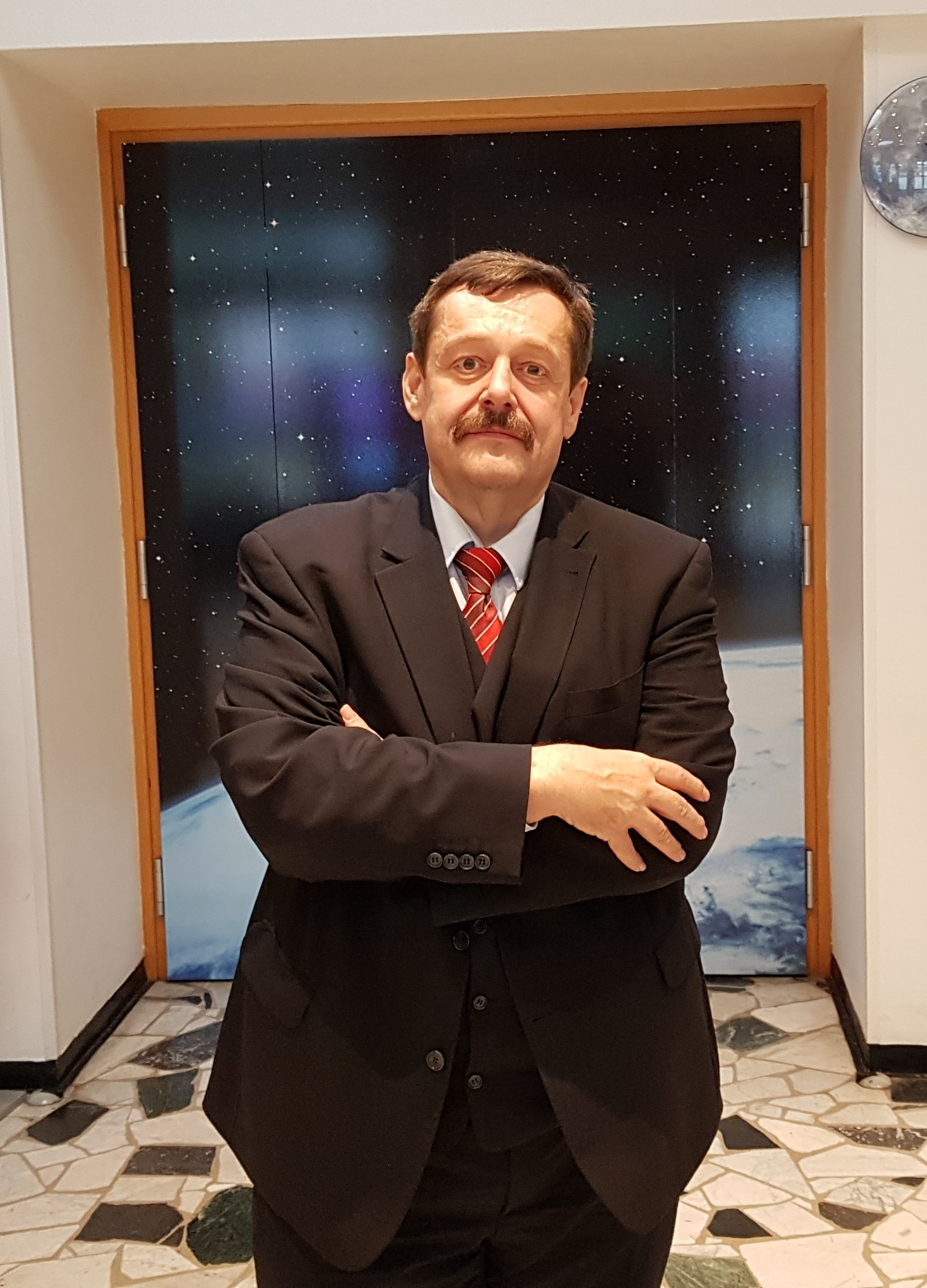 Foto von Werner Gruber im November 2018 im Planetarium Wien